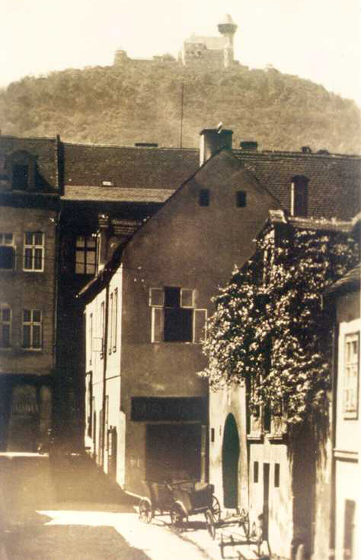 Hammerschmidt-Gasse in Most (Brüx) in Tschechien.